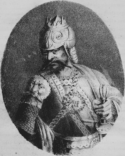 Беларуская (тарашкевіца): Партрэт вялікага князя Жыгімонта Кейстутавіча (Žygimont Kiejstutavič)